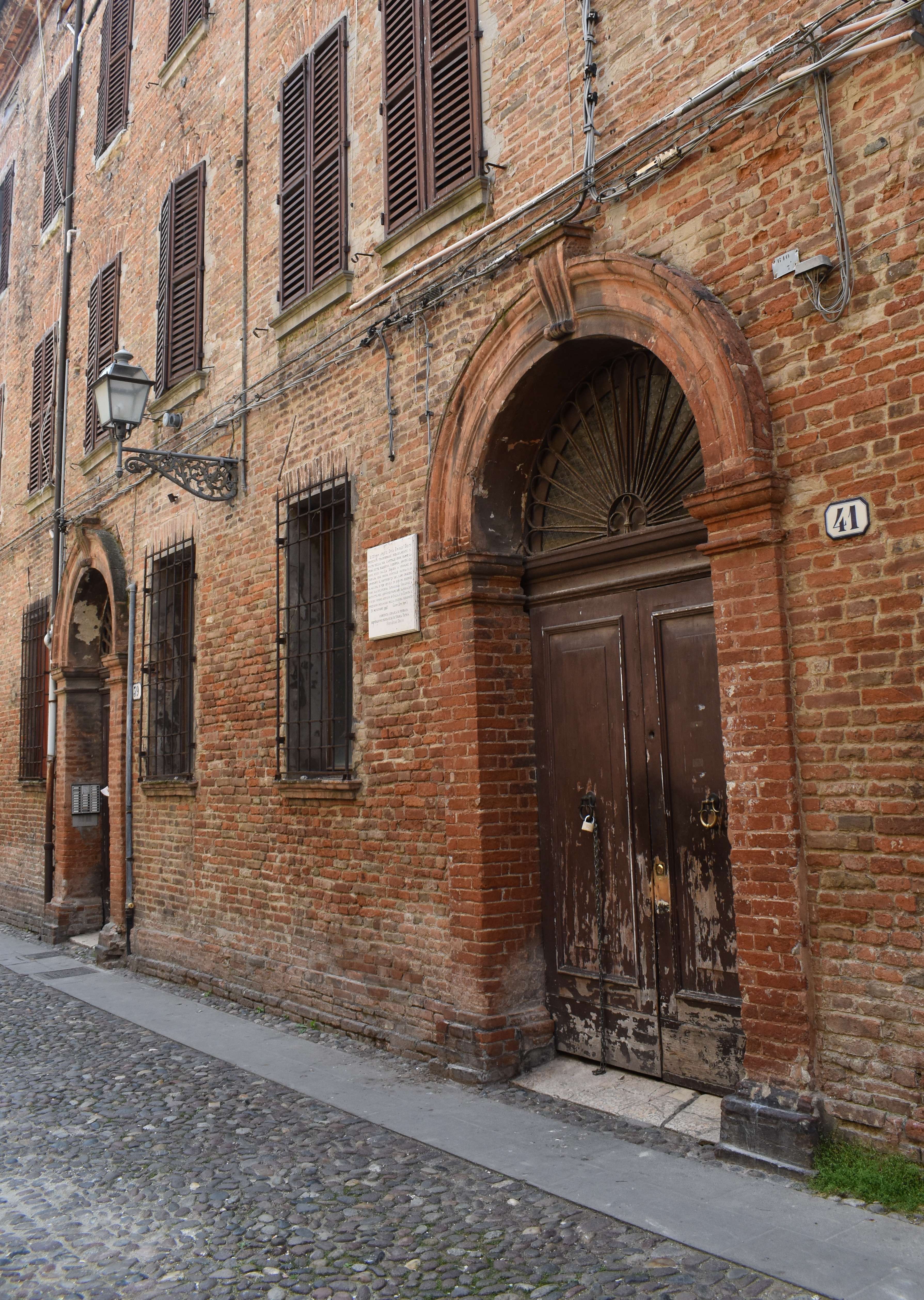 Scola spagnola di via Vittoria 41 a Ferrara